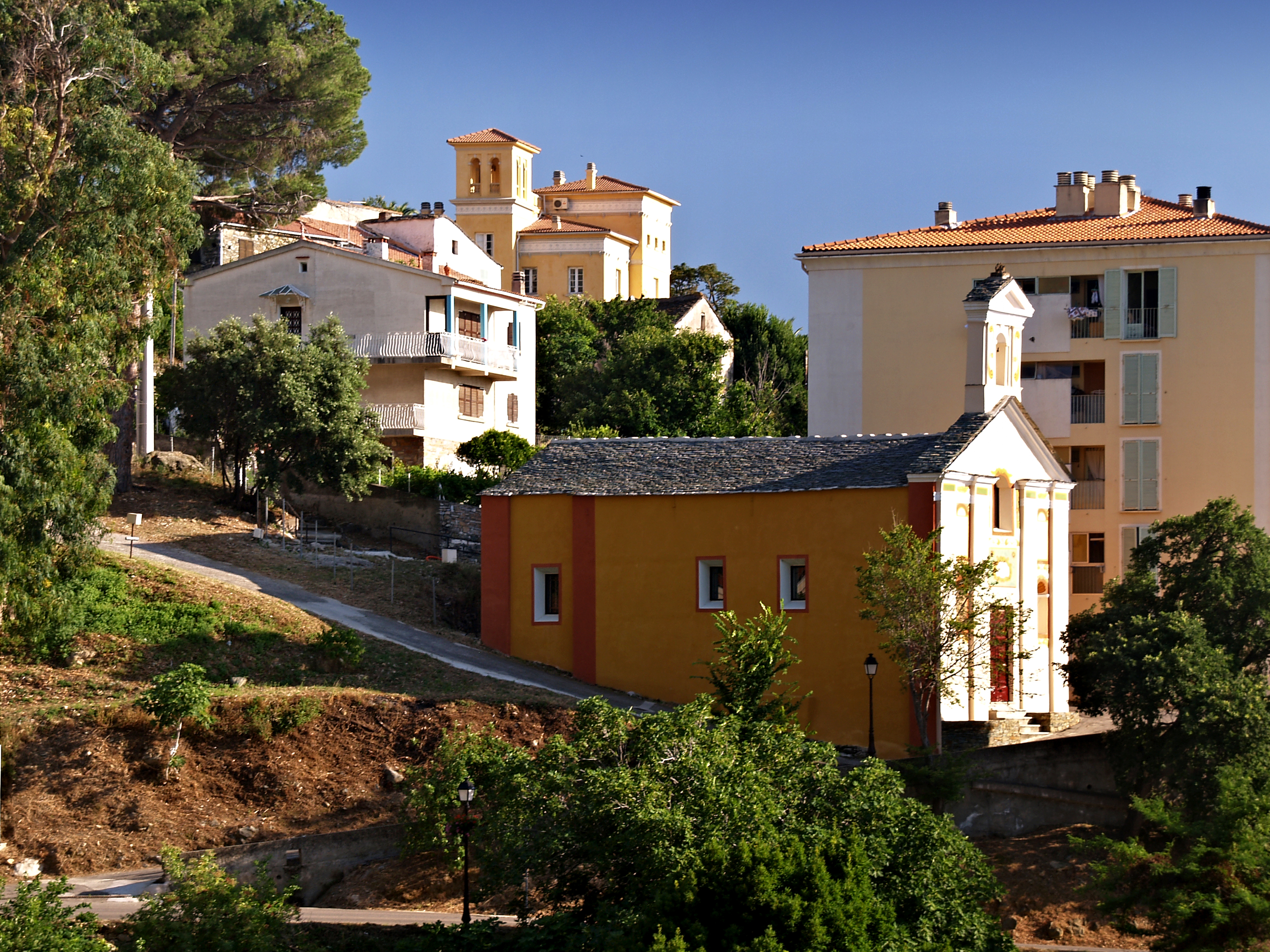 Oletta (Corse) - Chapelle Sainte-Croix Corsu: Oletta (Corsica) - Cappella Santa Croce